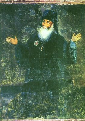 Митрополит Бодбийско-Сигнахский Иоанн (Макашвили). Роспись церкви во имя вмч. Георгия в монастыре Бодбе. 1832 г.